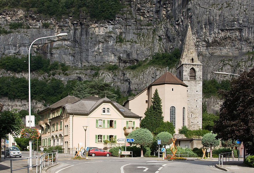 Kirche St. Sigismond in St-Maurics